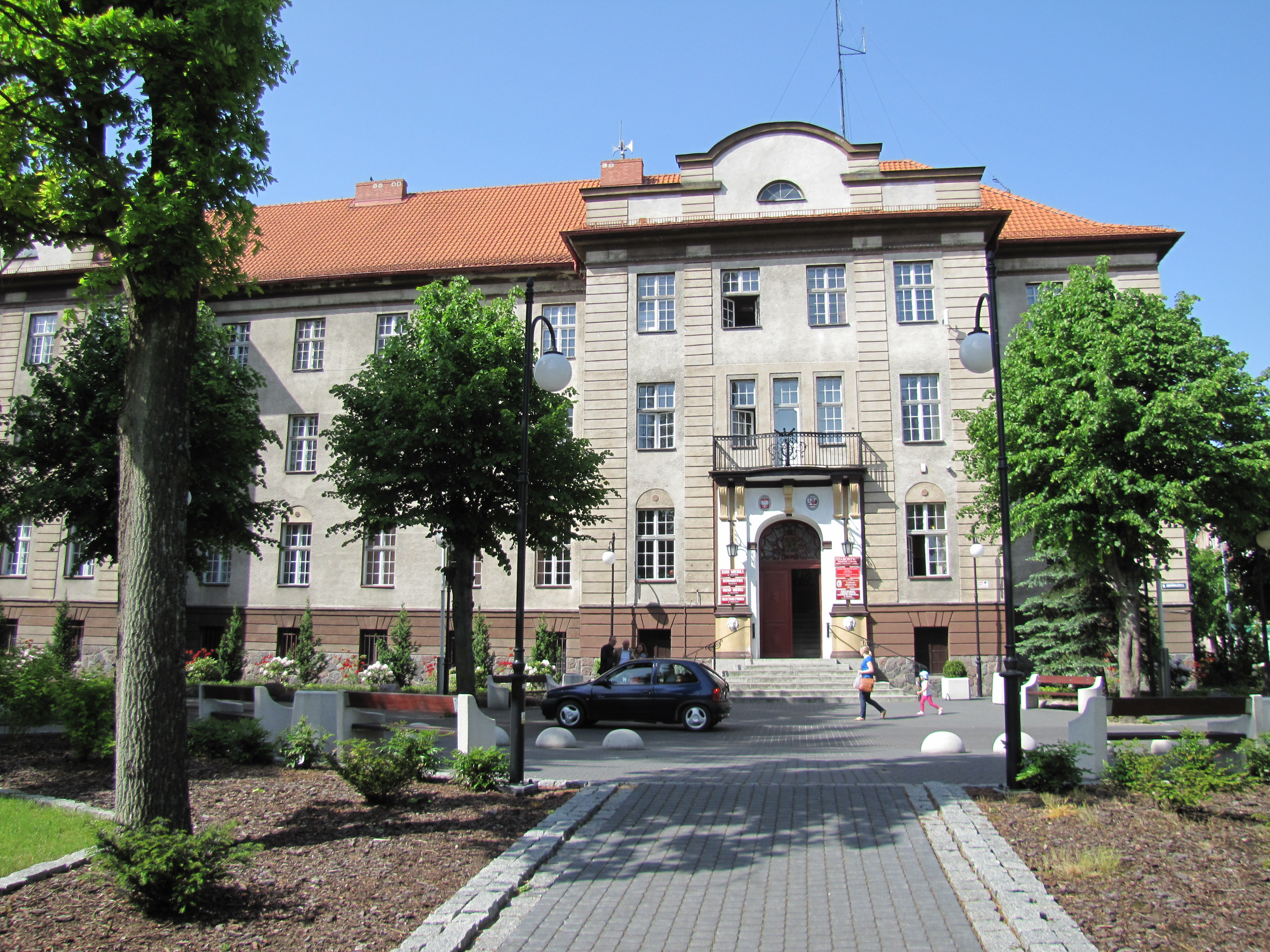 Miastko, ul. Grunwaldzka 1 - Urząd Miejski.